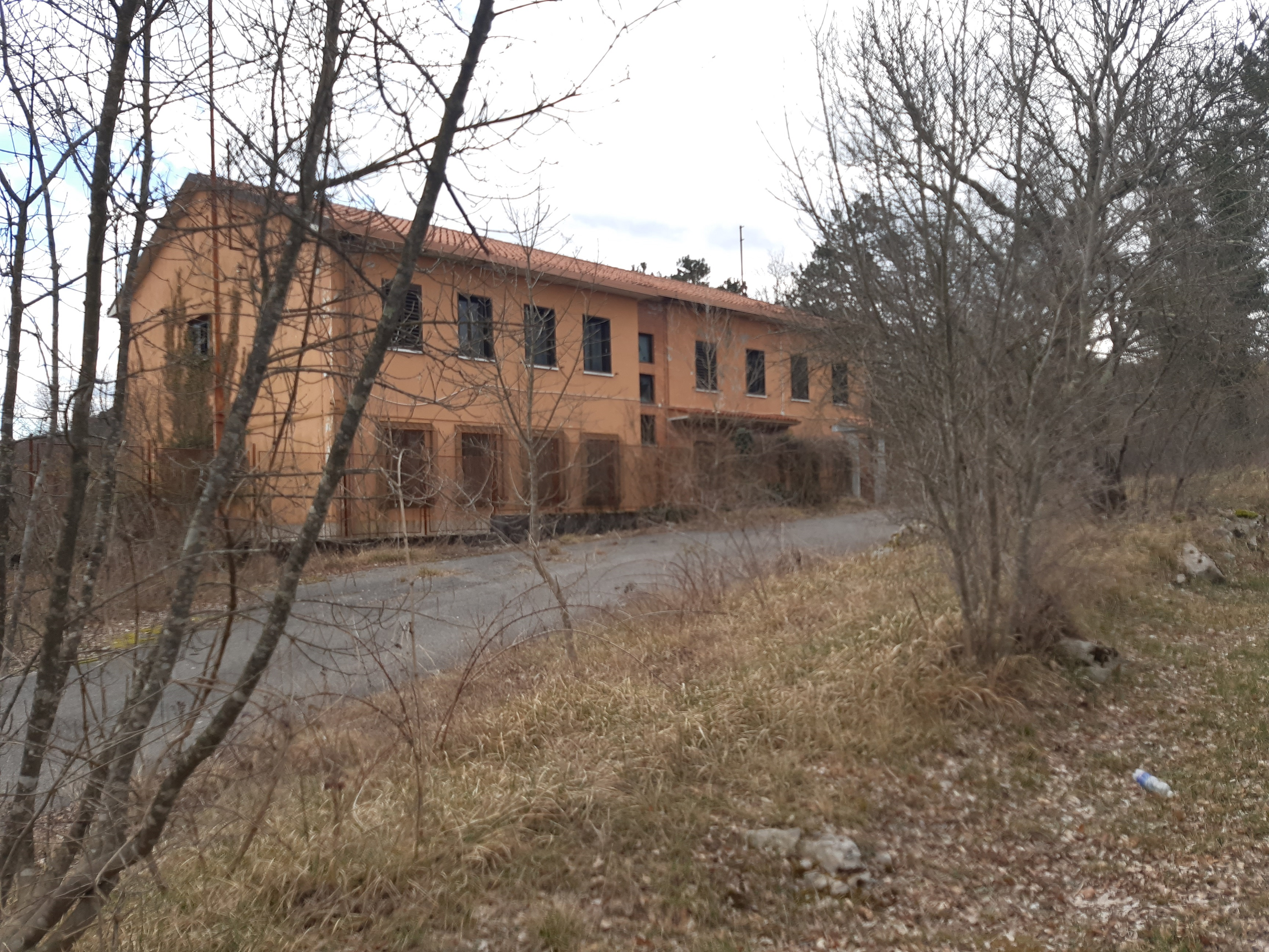 Edificio adibito un tempo quale caserma dei carabinieri presso il valico di S.Pelagio